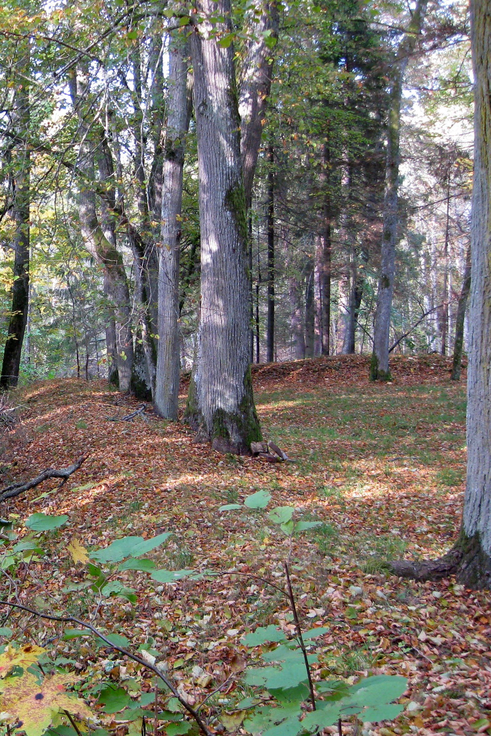 Ugāles pilskalns, Ugāles pagasts